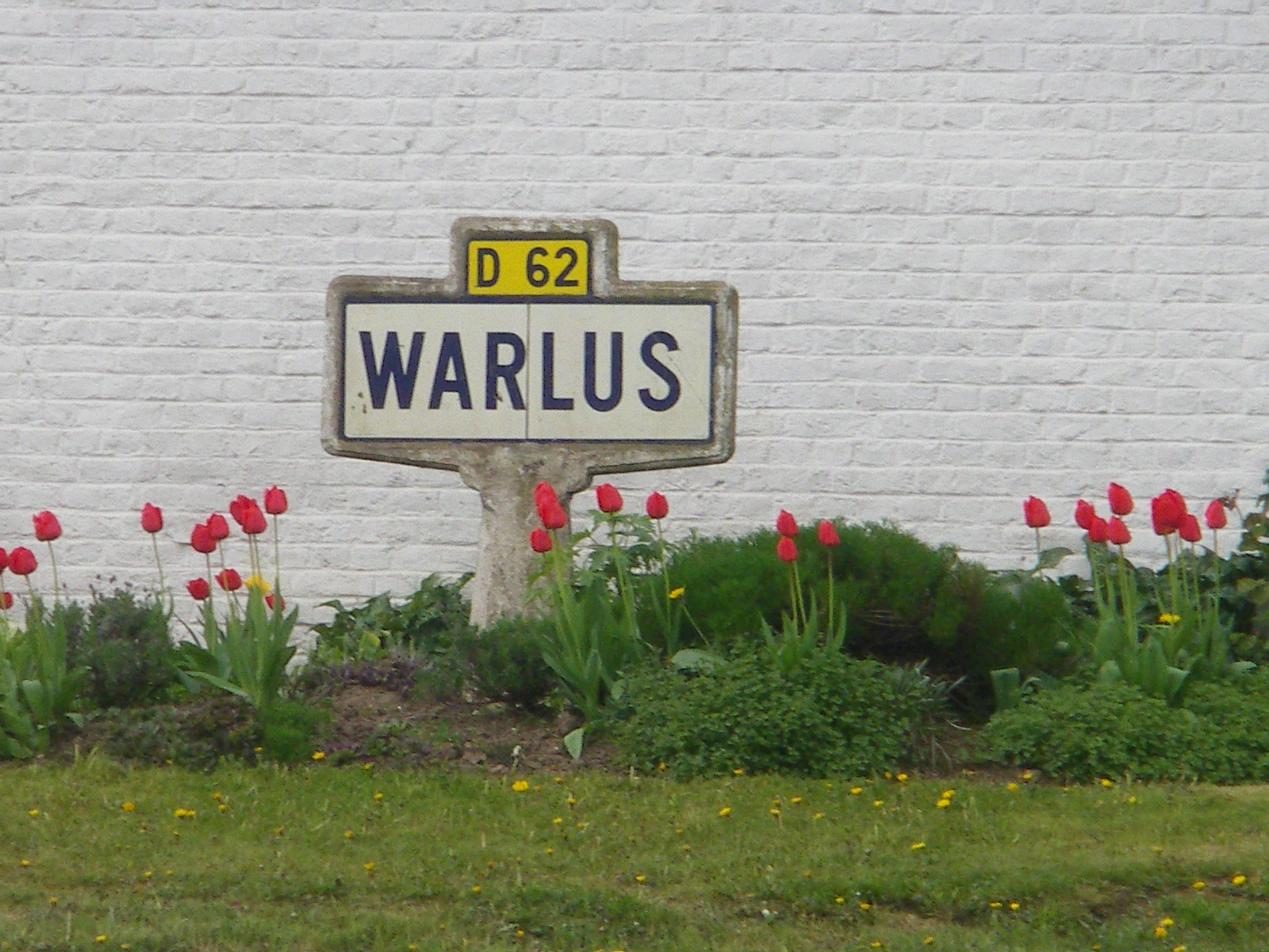 Ancien panneau d'entrée de Warlus dans le Pas-de-Calais. Le panneau est situé à l'intersection des routes départementales D59 et D62.